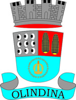 Brasão de Olindina